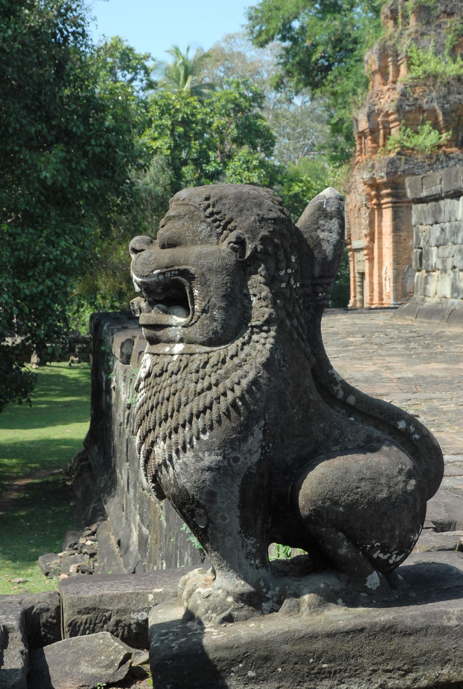 Cambodge, site archéologique d'Angkor (zone de Rolûos), temple de Bakong : lion